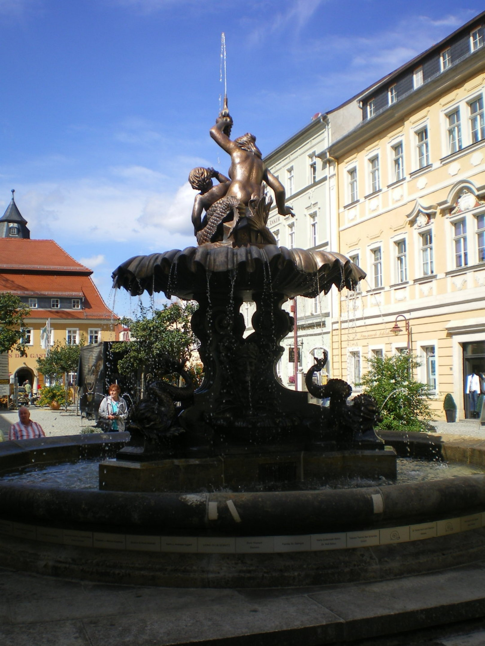 Bad Schandau, Sendigbrunnen.